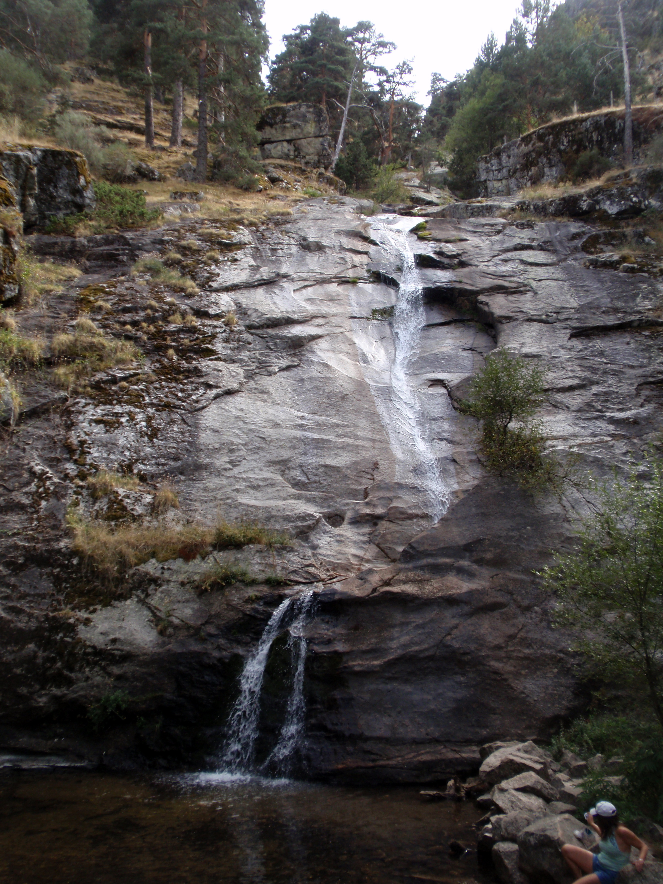 Cascada de El Cohho. Navaf´ria. Segovia (España)